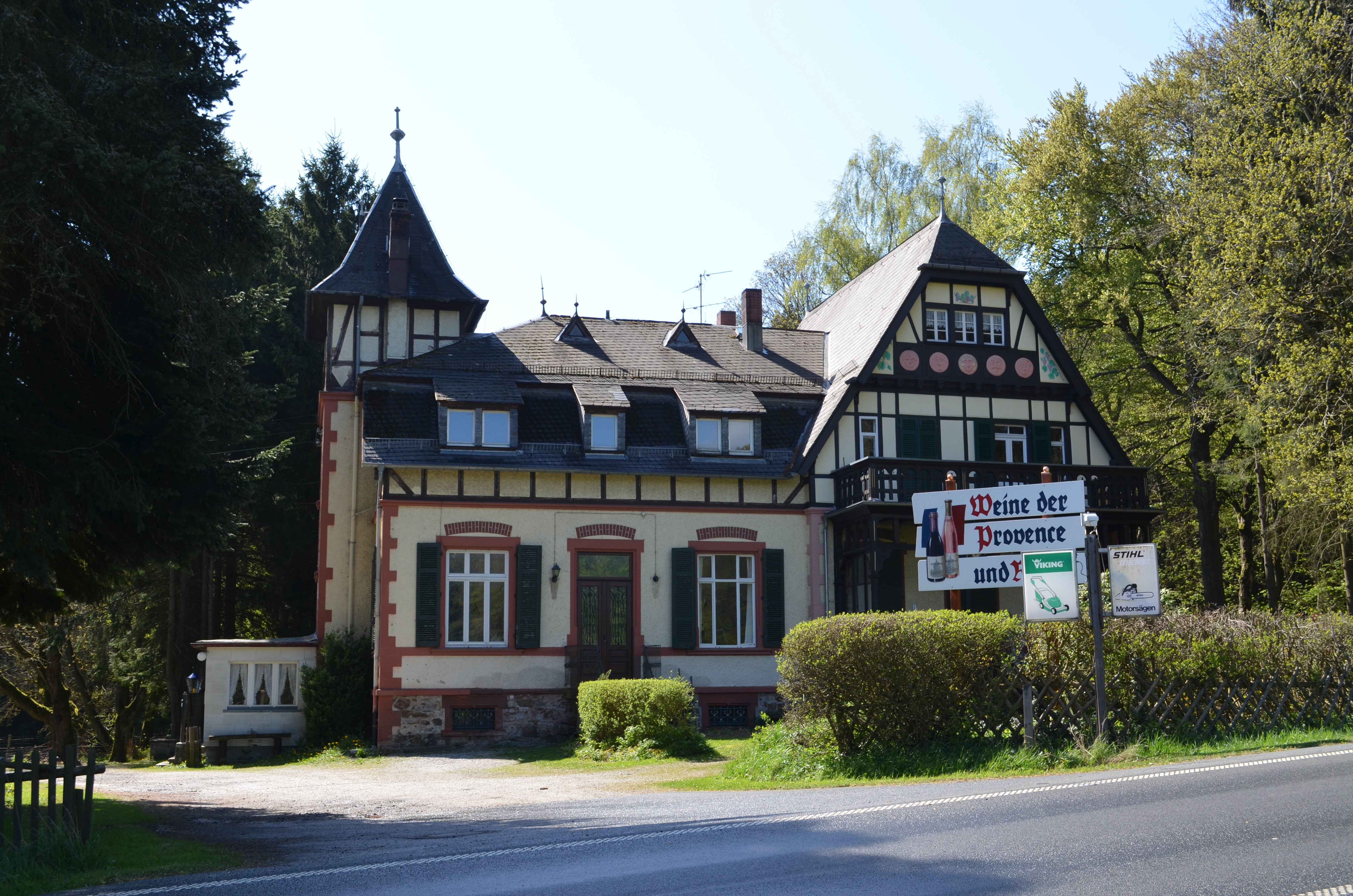 Königstein, Gasthof Billtalhöhe